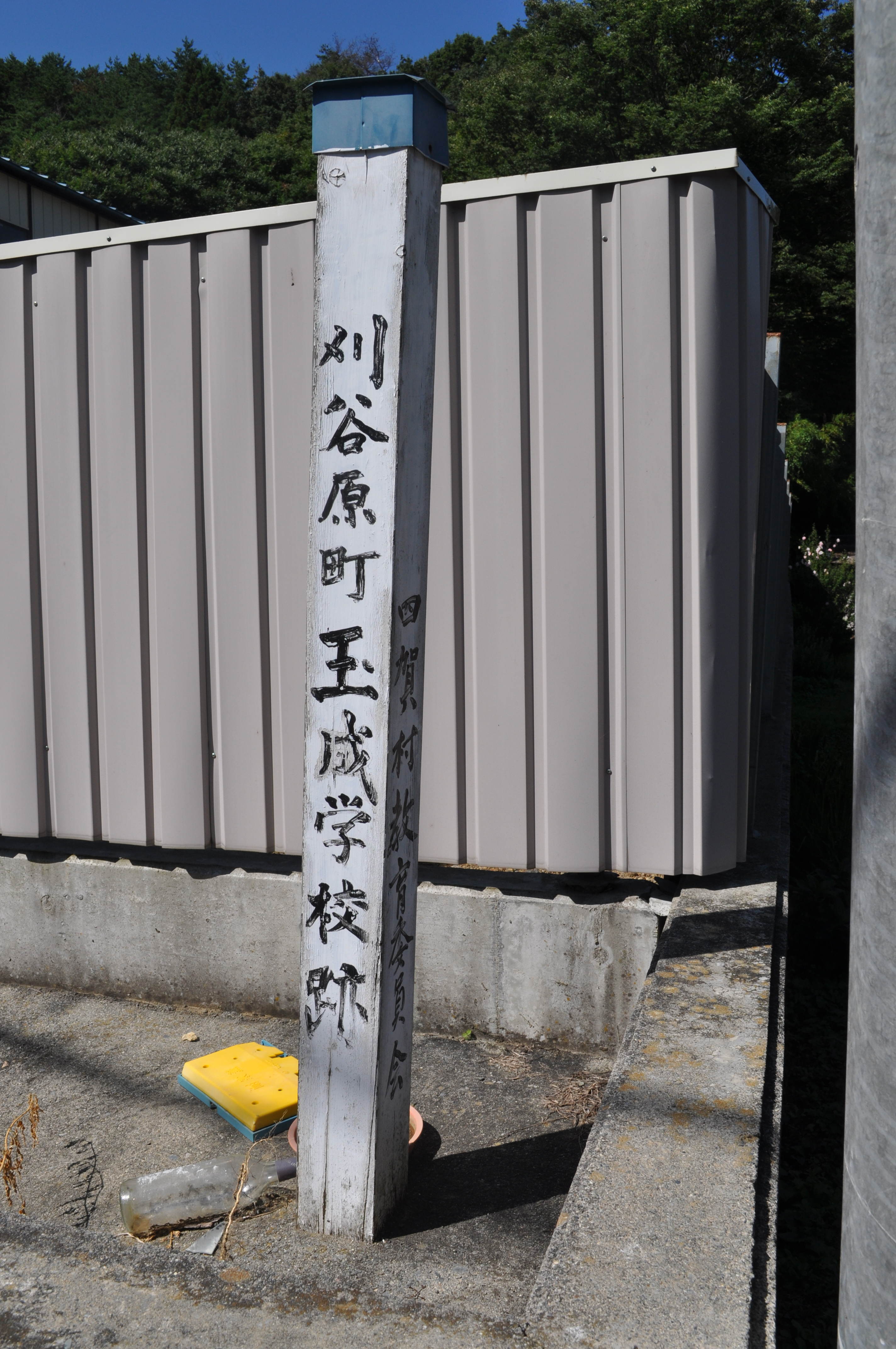 玉成学校は、明治５（1,972）年に開校した学校で、現在は錦部小学校に統合を経て、松本市立四賀小学校に統合（2013年3月）されています。